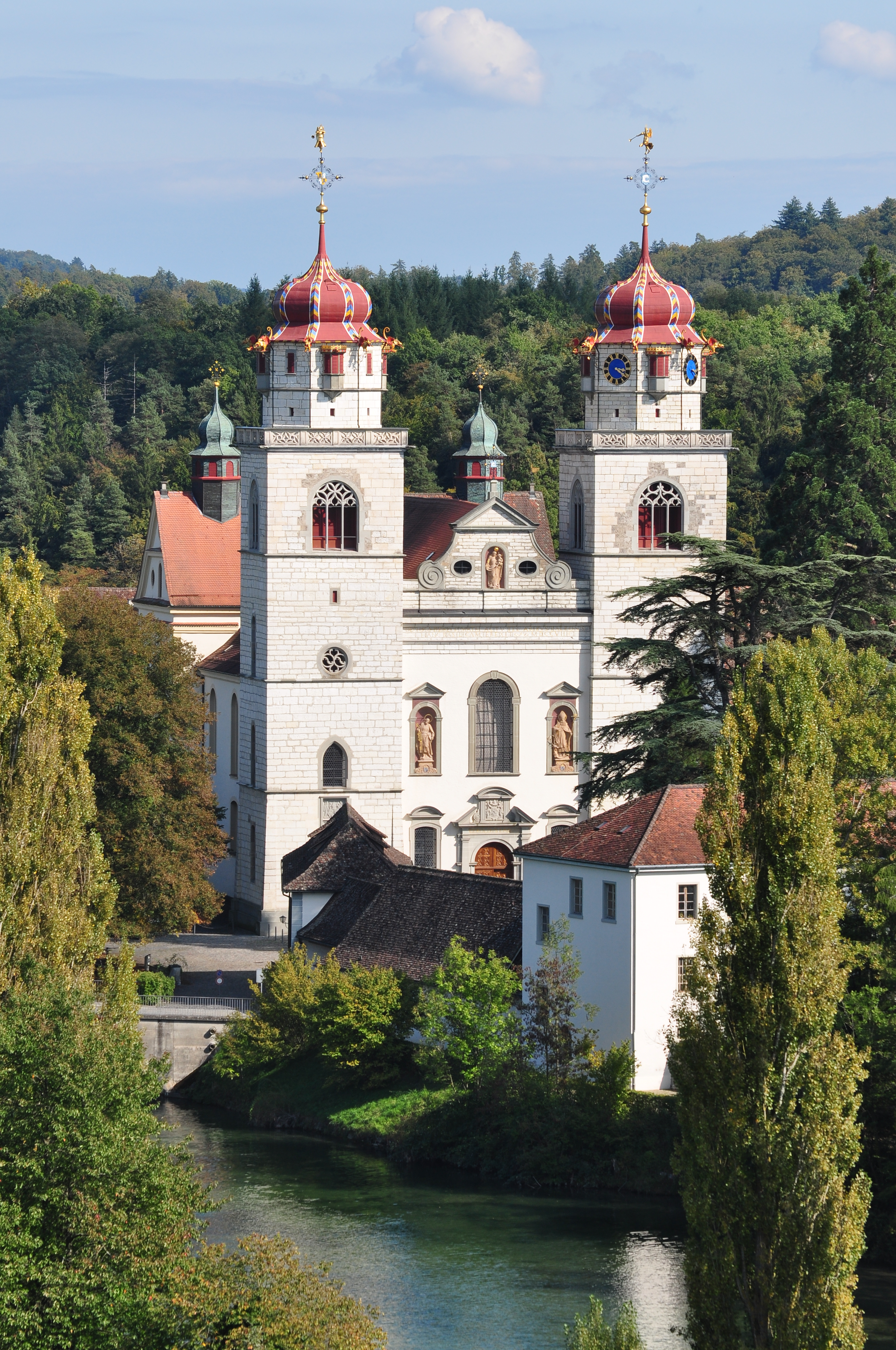 Ehemalige Benediktinerabtei, Alt-Rheinau in Rheinau (Switzerland)